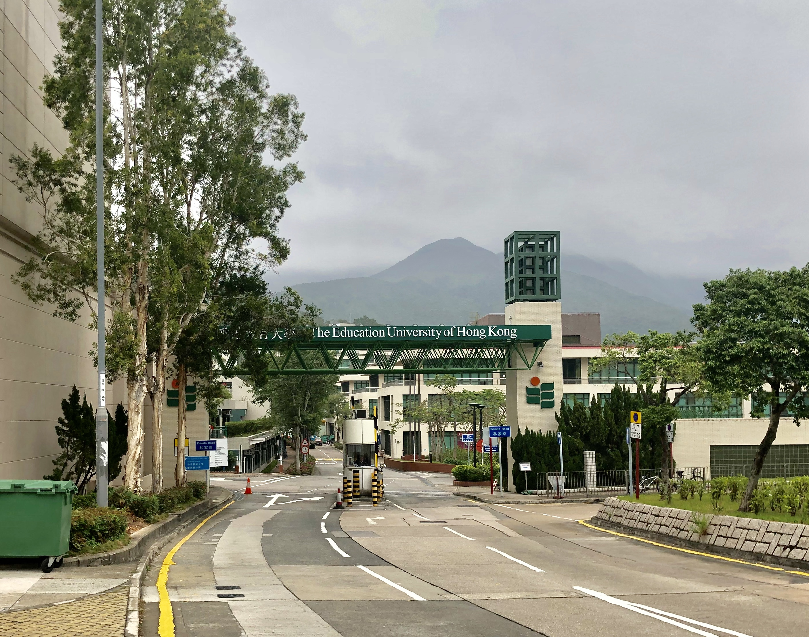 香港教育學院大埔校園入口，於淺月灣門口對出拍攝